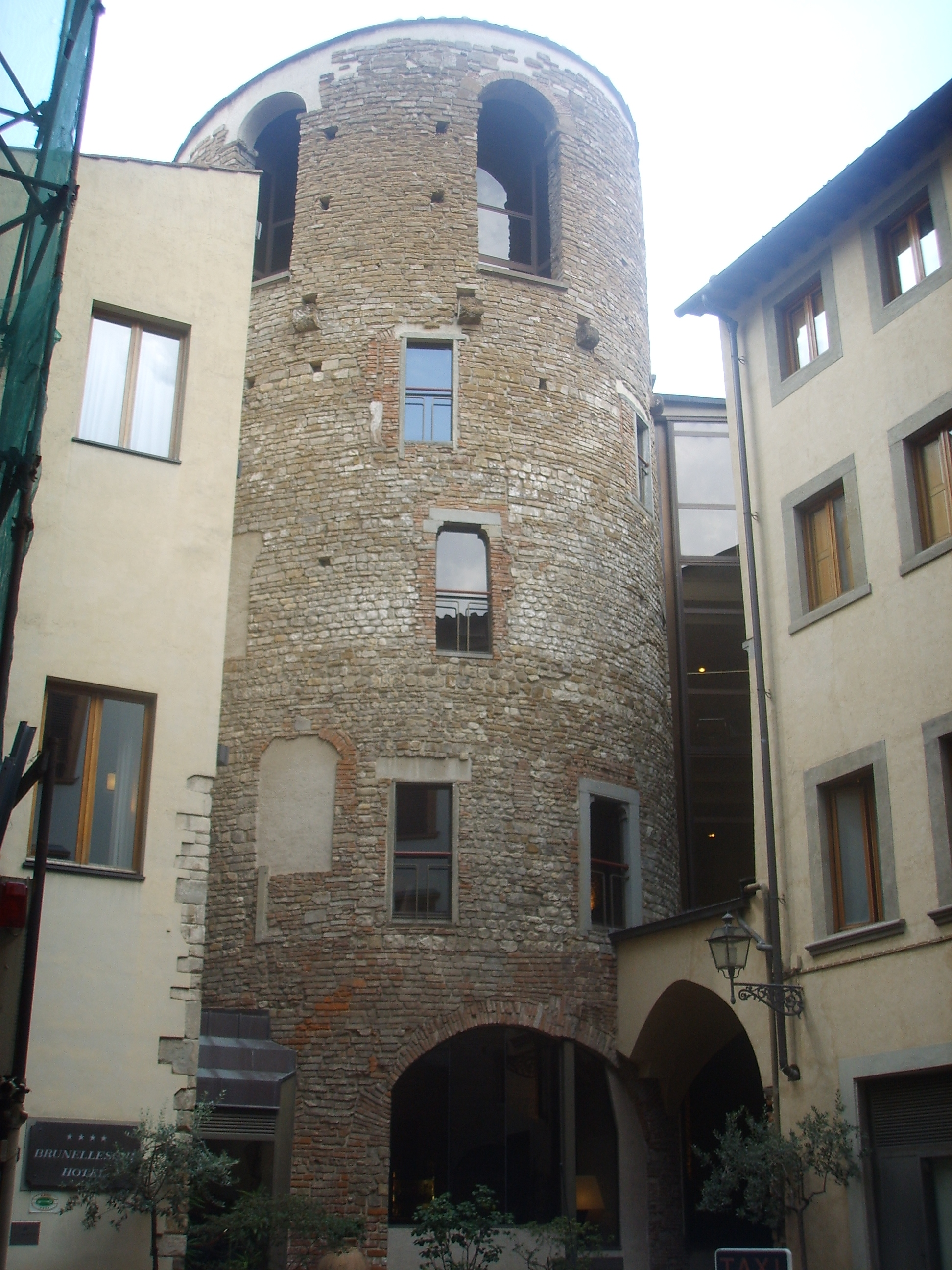 Torre della Pagliazza in Florence, Italy